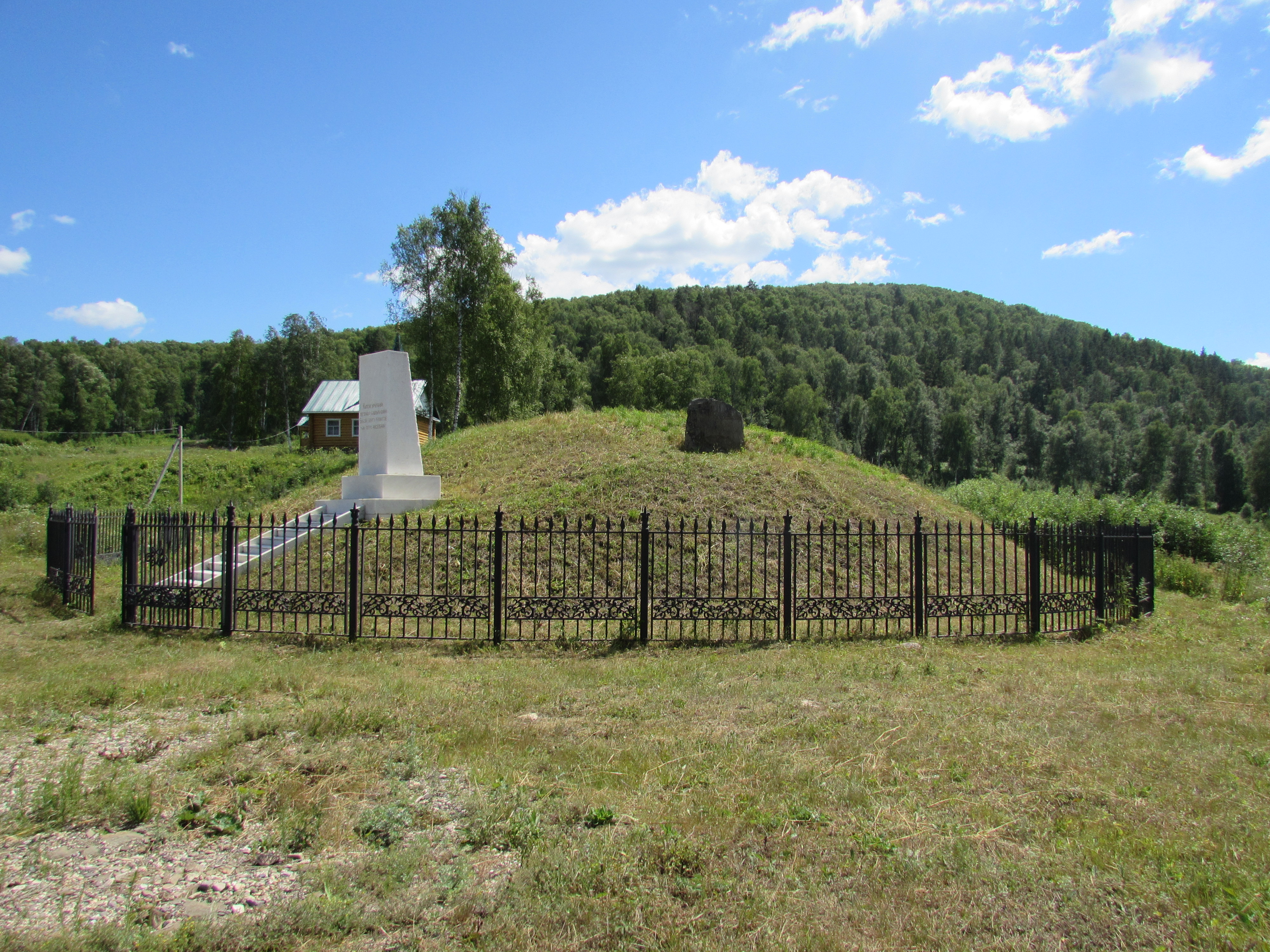 Башҡортса: Башҡорт викимедиасыларының Шүлгәнташҡа сәйәхәте